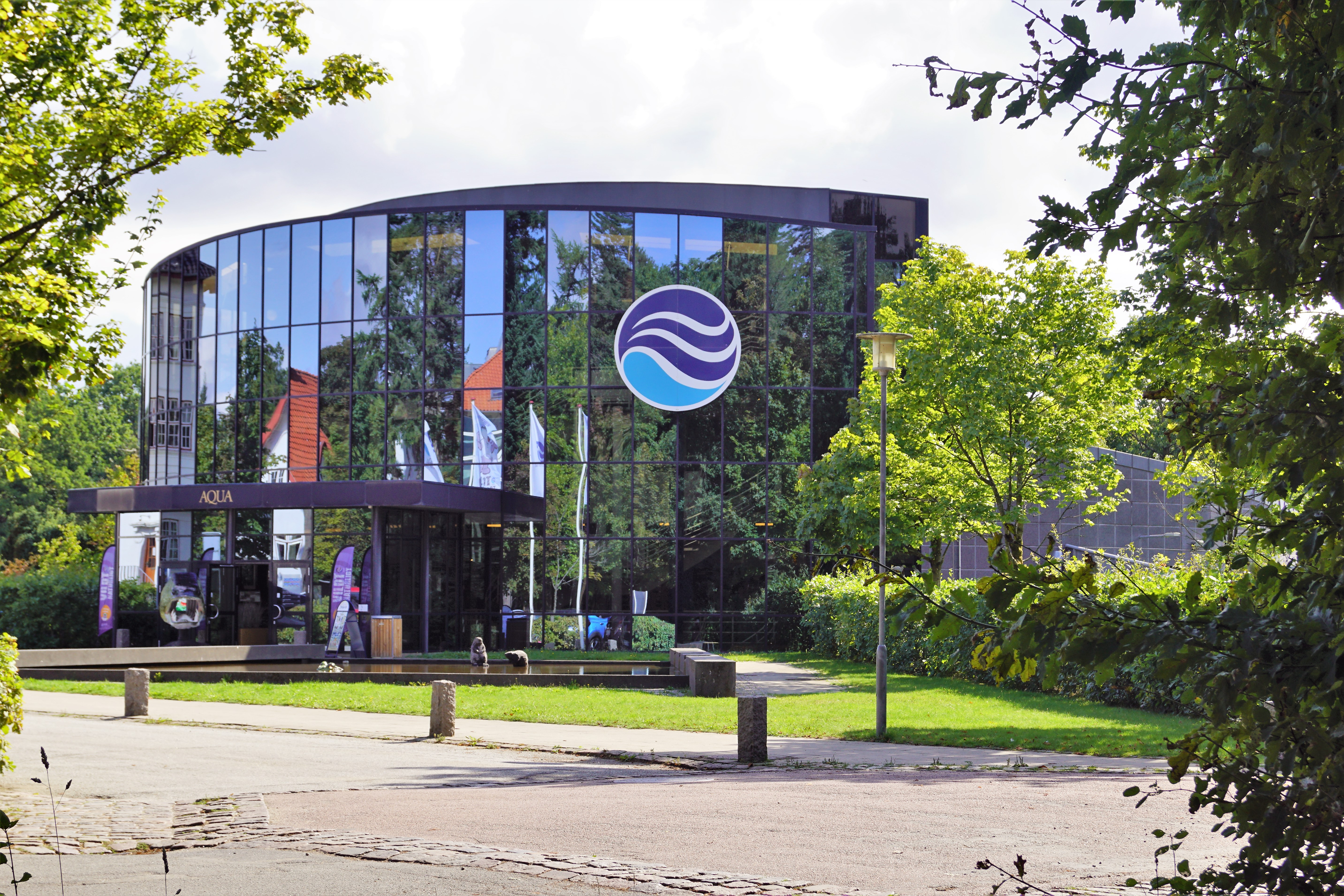 Facaden på Aqua Silkeborg